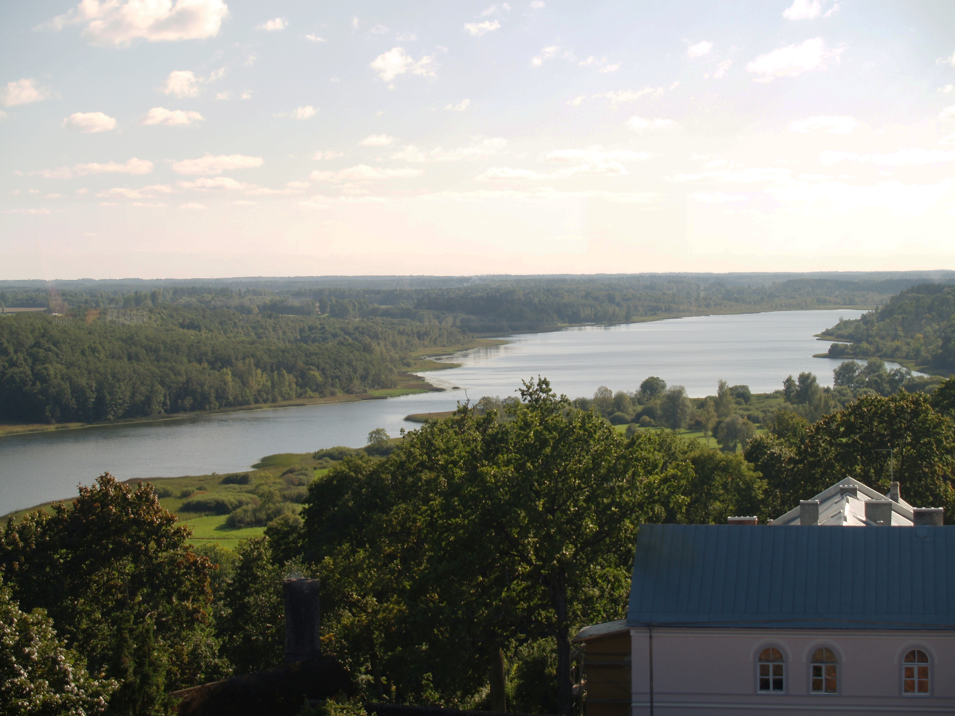 Viljandi järv pildistatuna vanast veetornist.